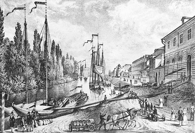 Karlínský přístav (dnes Pobřežní ulice) před polovinou 19. století. Litografie, Muzeum hlav. města Prahy.